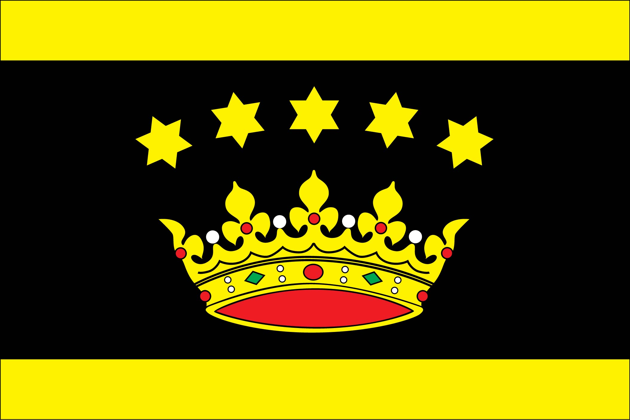 prapor obce Jankov (okres Benešov).